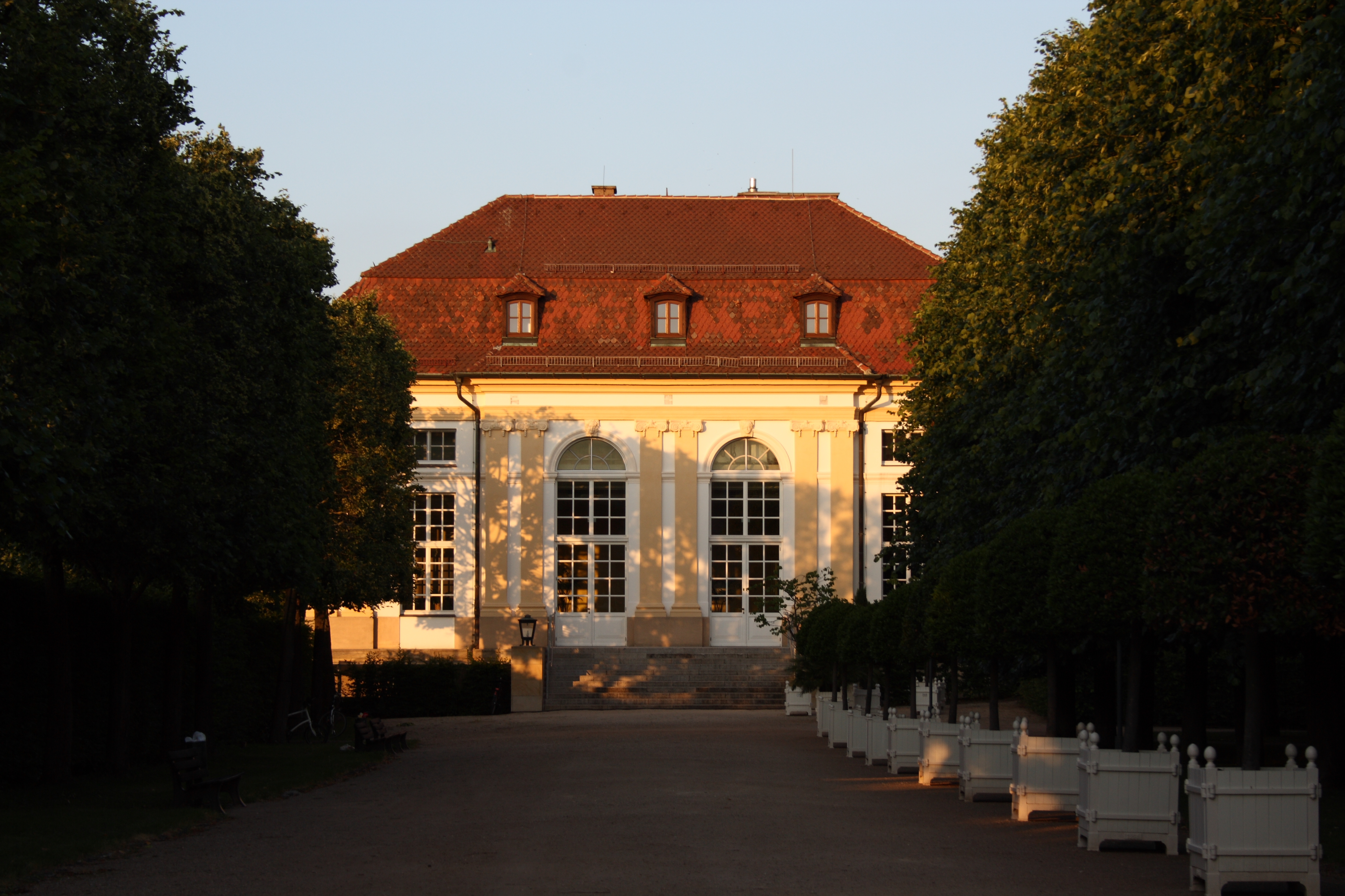 Orangerie in Ansbach